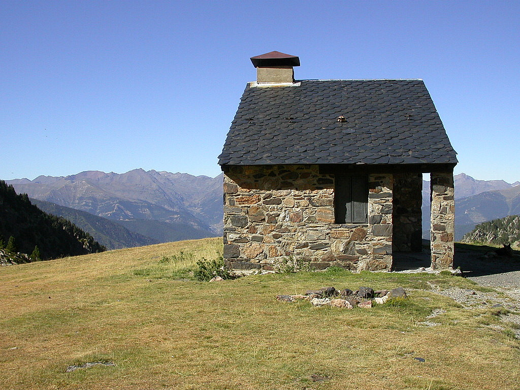 Refuges Andorre Refugi de Prat Primer